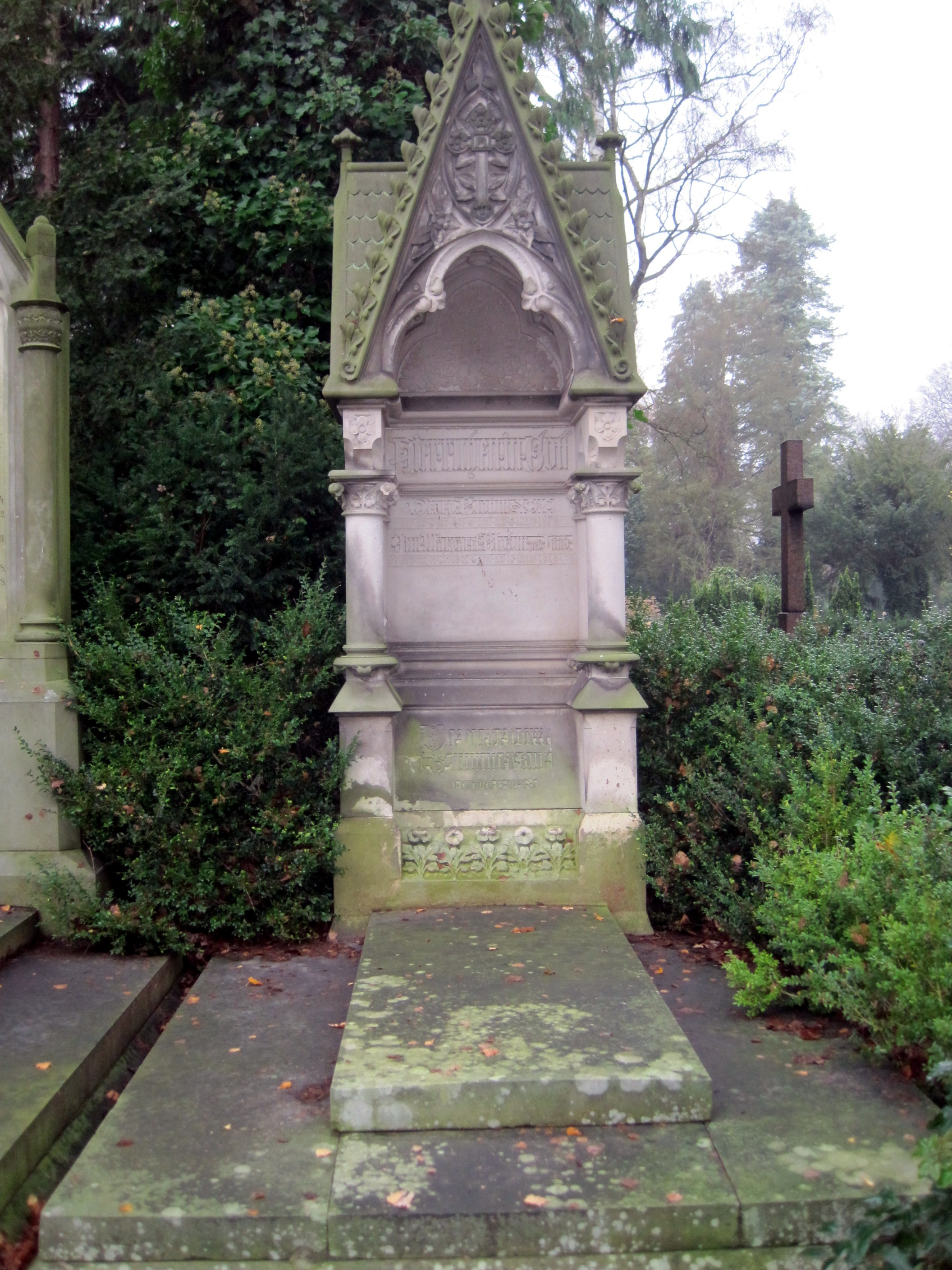 Erbbegräbnis der Familie Georg Blohm (1801–1878) auf dem Burgtorfriedhof.